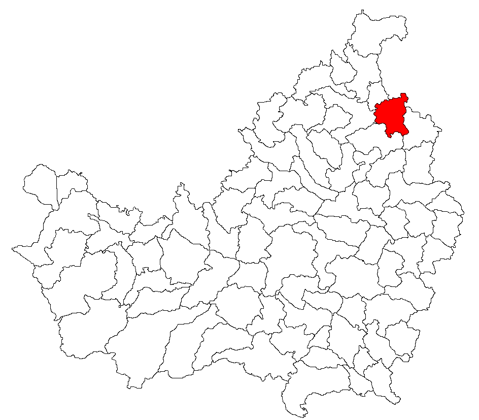 Categorie:Hărţi ale judeţului Cluj